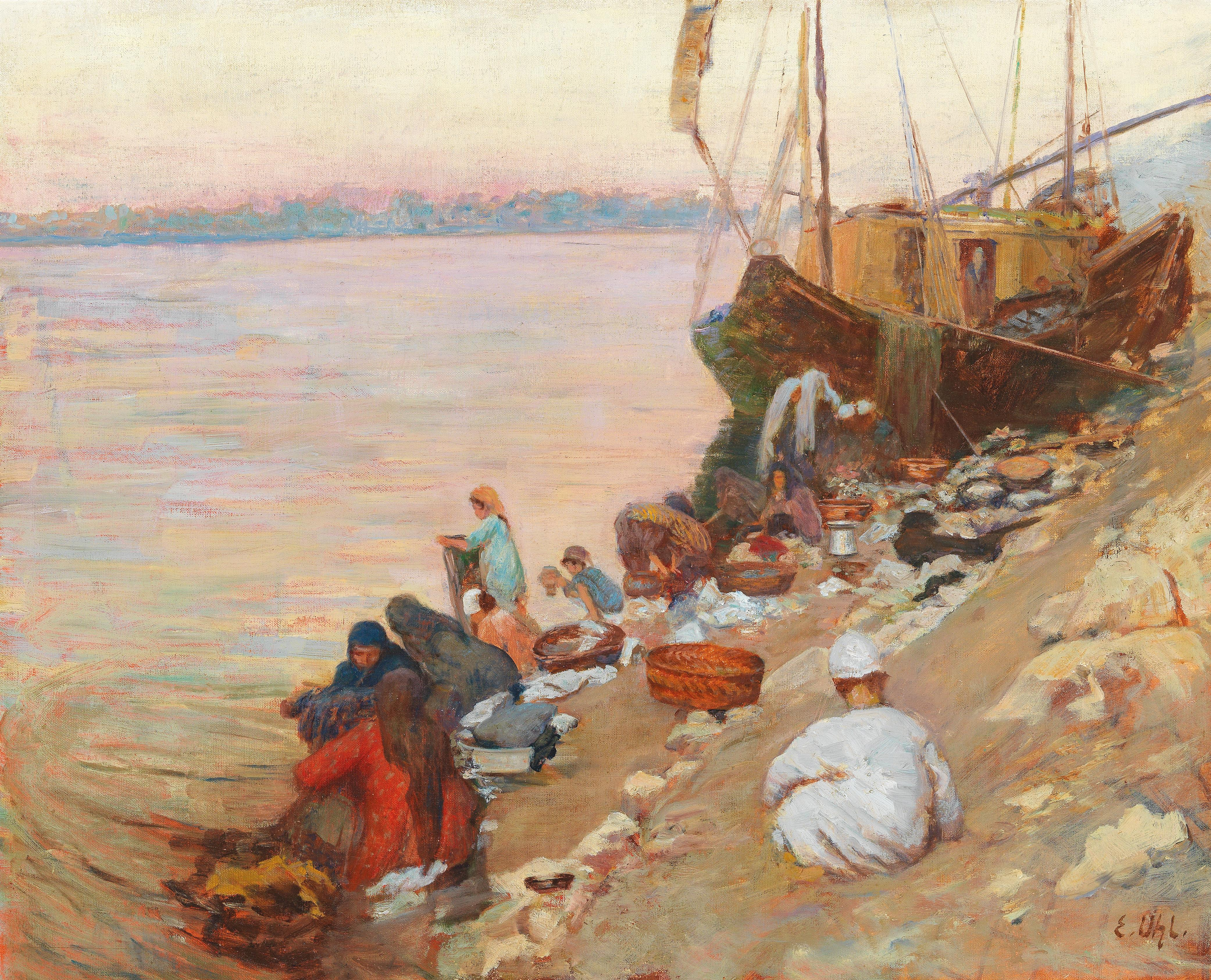 Wäscherinnen am Nilufer, signiert E. Uhl, rückseitig betitelt 789, "Am Nil" E. Uhl, Öl auf Leinwand, 56,5 x 69, 5 cm